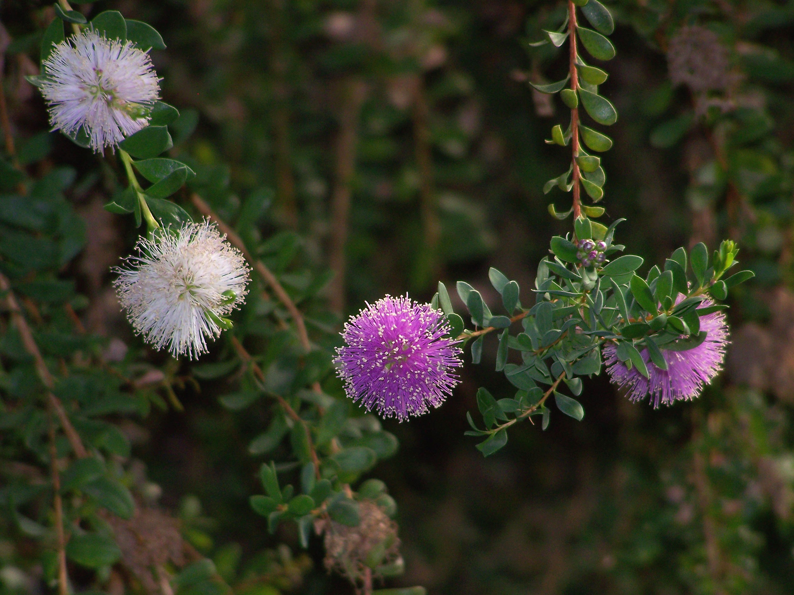 Insel-Myrtenheide (Melaleuca Nesophila), Botanischer Garten Berlin